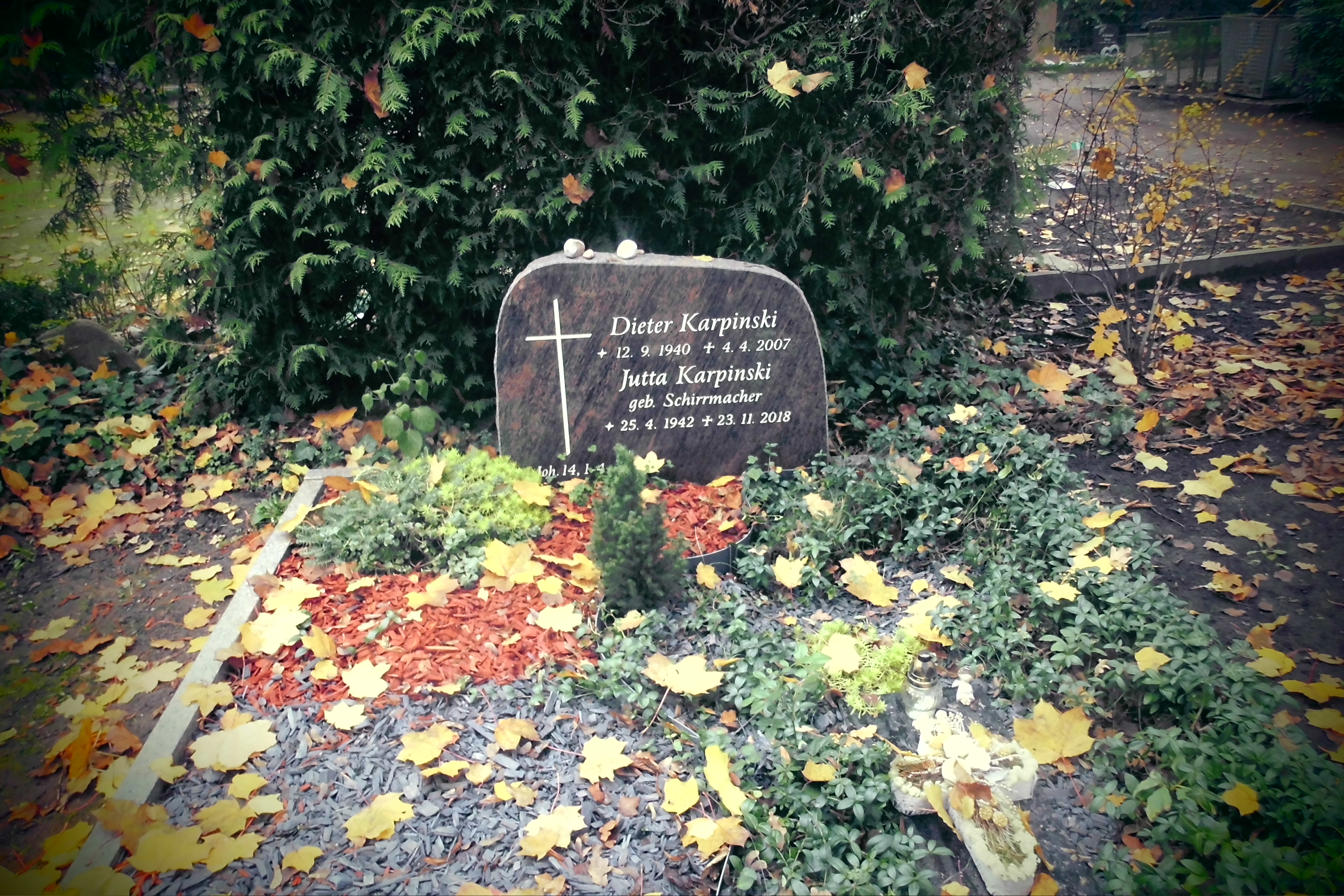 Grab Dieter Karpinski